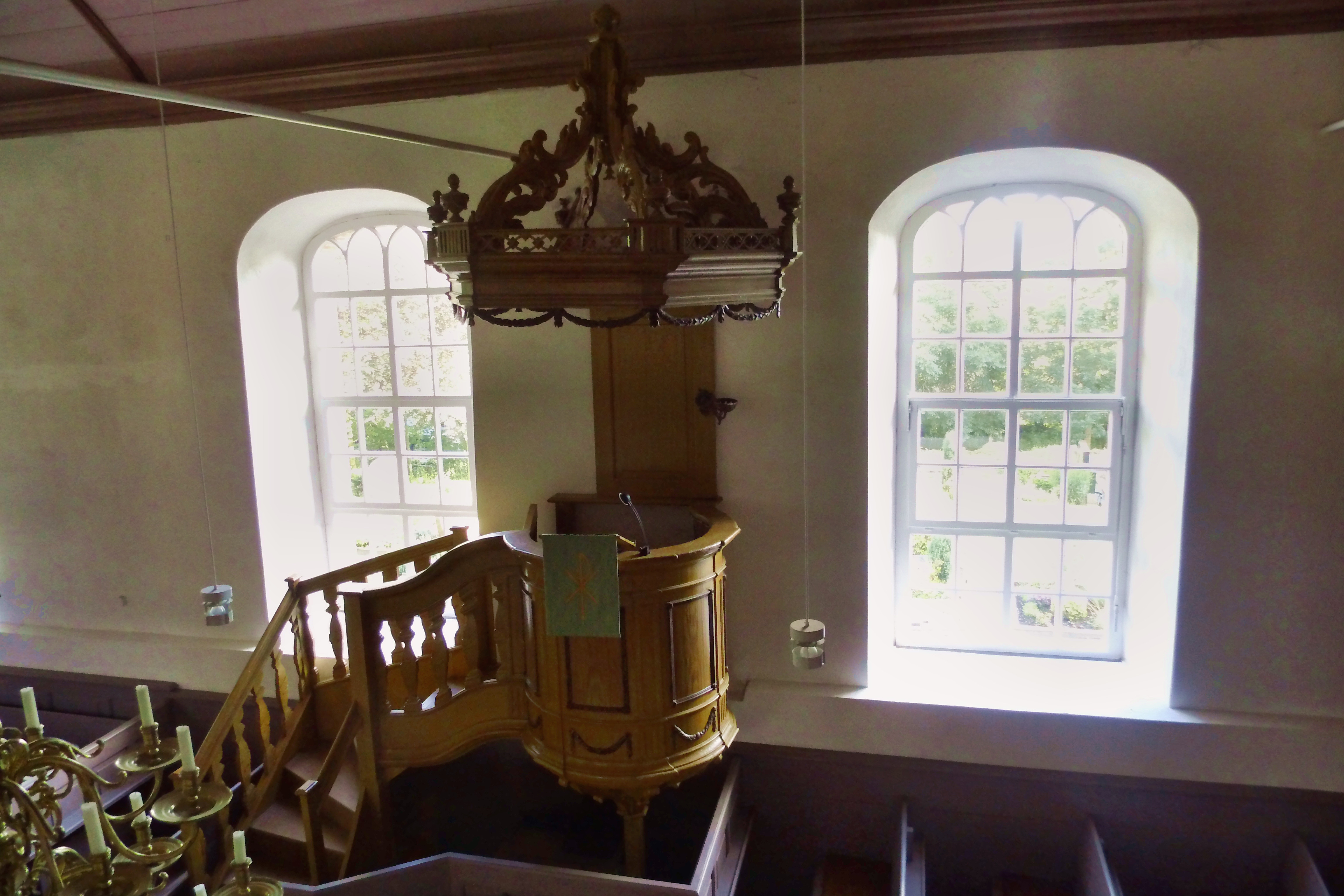 Klassizistische Kanzel der Evangelisch-lutherischen Kirche Berdum (Stadtteil von Wittmund, Ostfriesland, Niedersachsen, Deutschland)